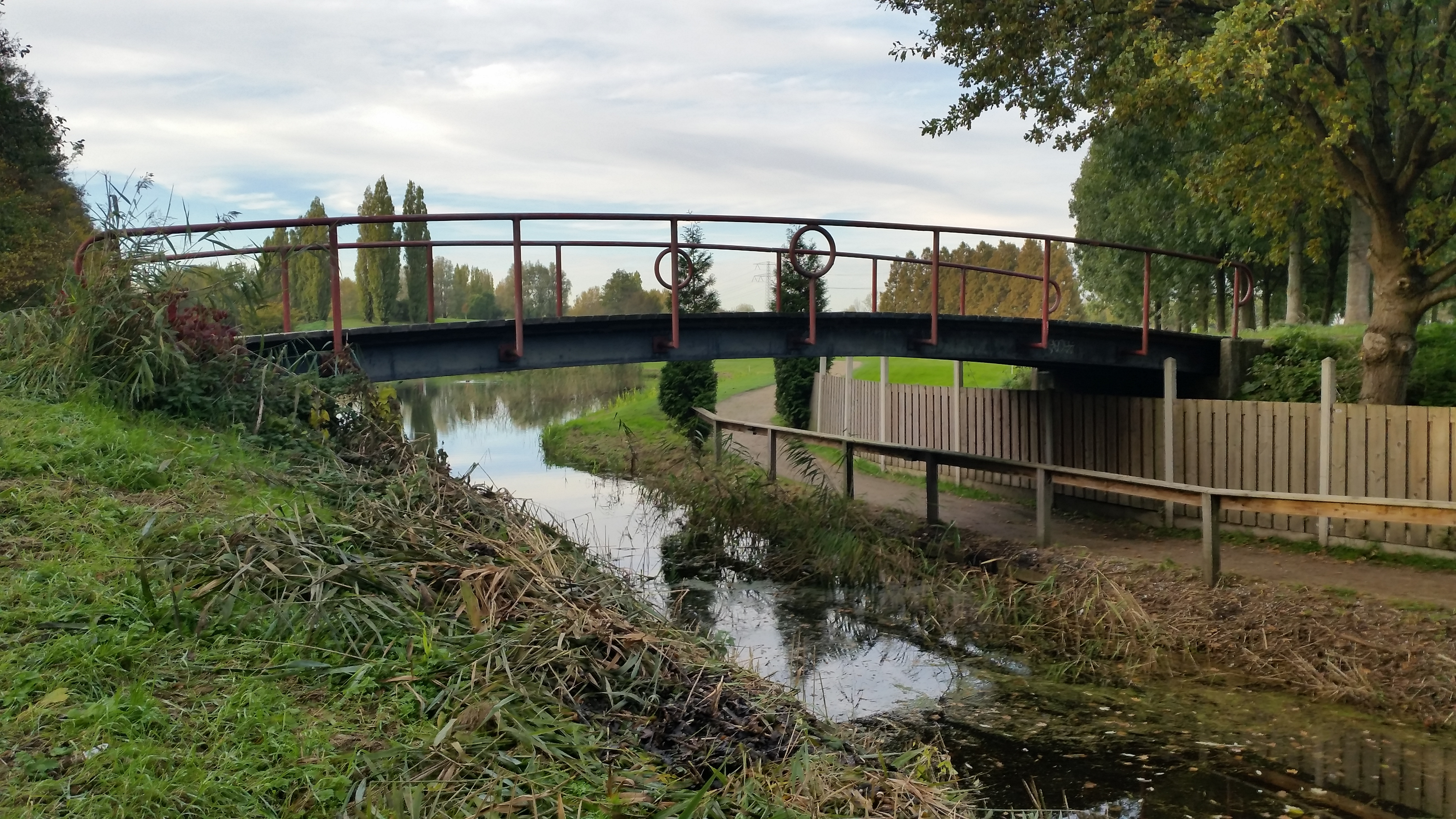 Zijaanzicht van Brug 1755 (in Buikslotermeer)